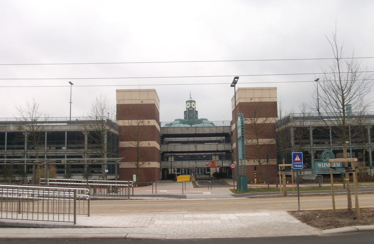 Wijnegem Shopping Center